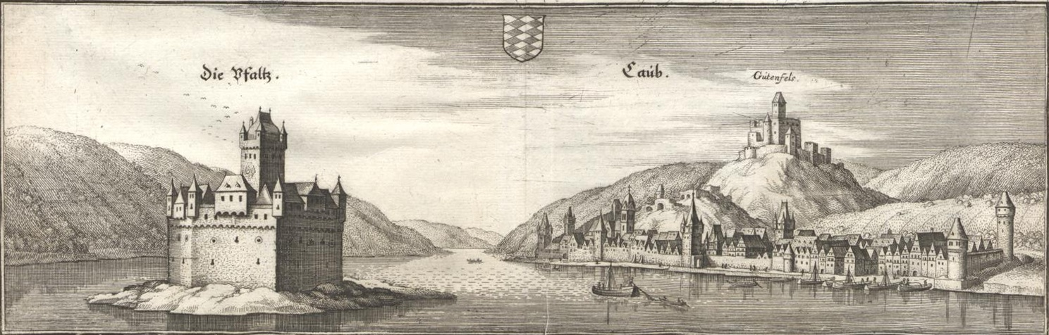 Burg Pfalzgrafenstein, Kaub und Burg Gutenfels